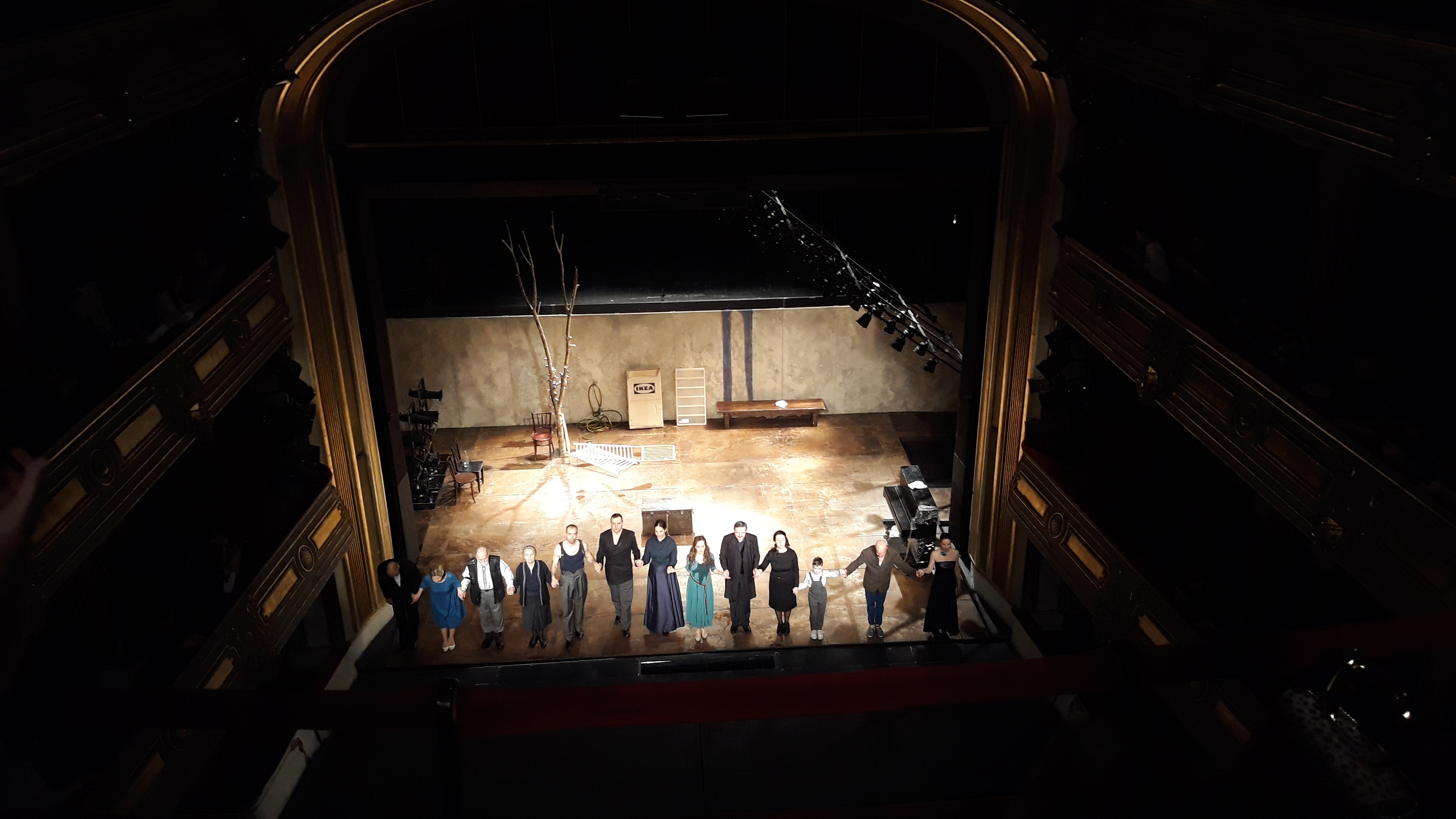 Представа „Нечиста крв”, Народног позоришта у Београду